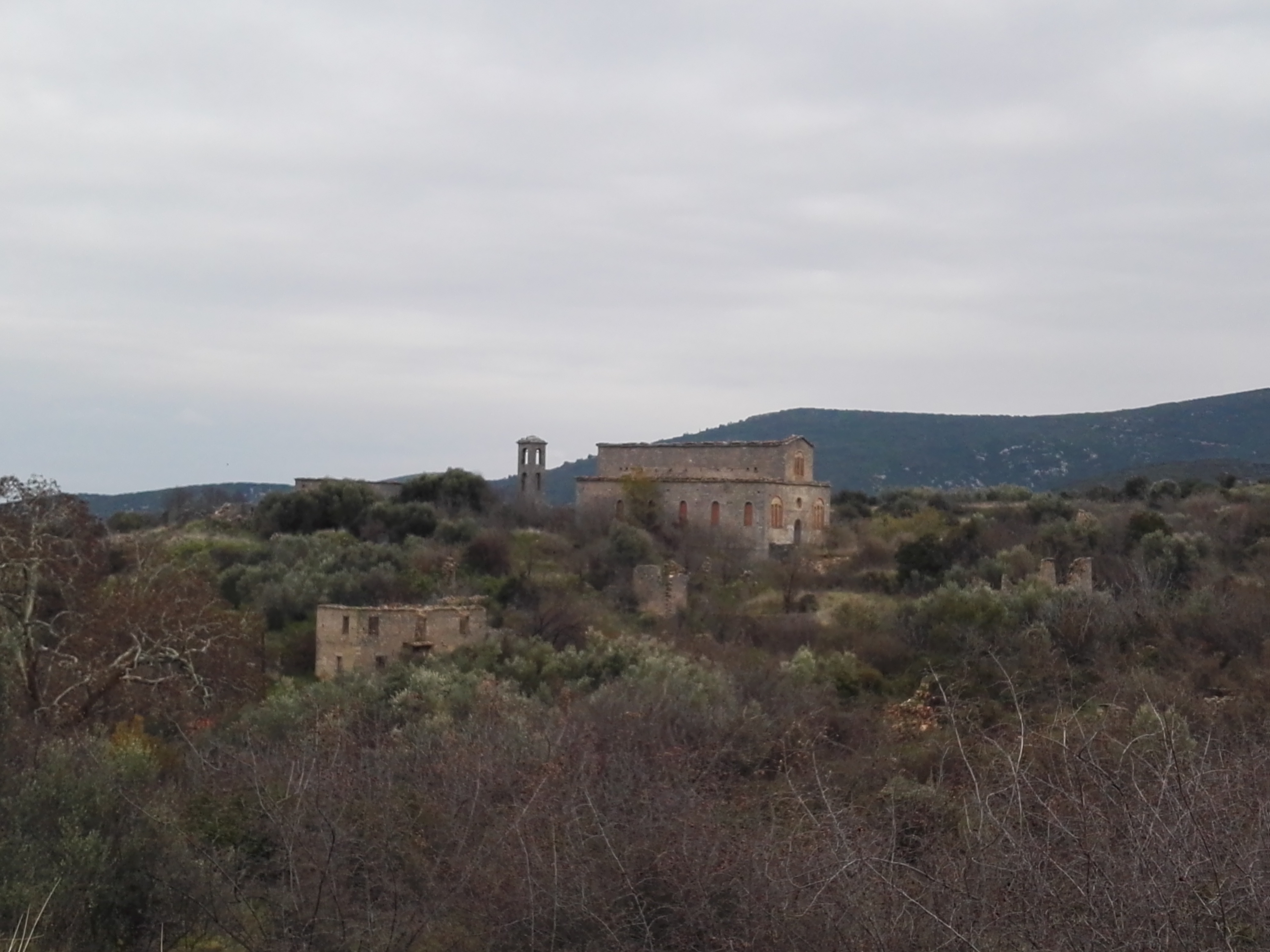 Ιερός Ναός Αγίου Ιωάννου Παλαιός Πλάτανος